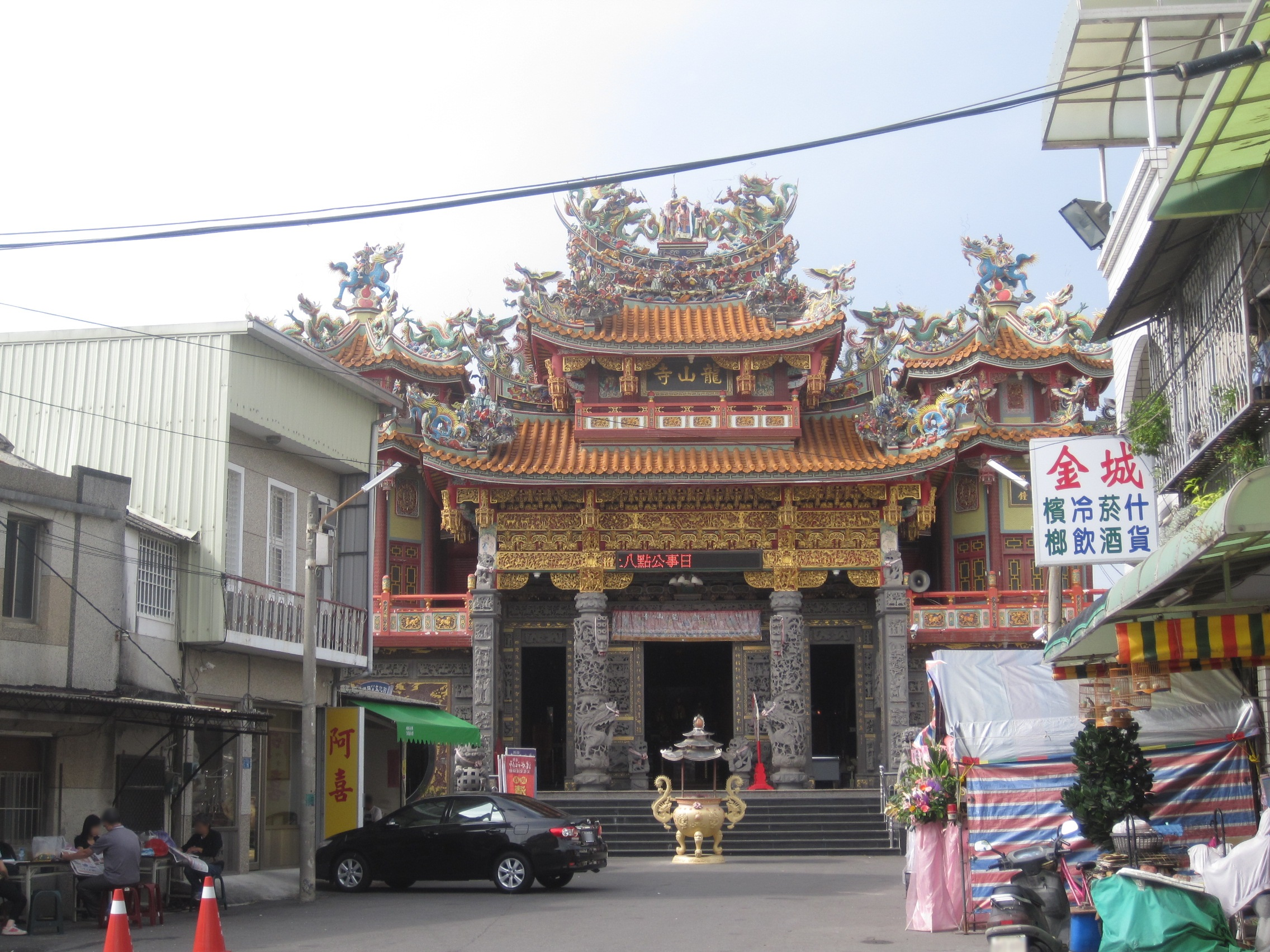 四鯤鯓龍山寺